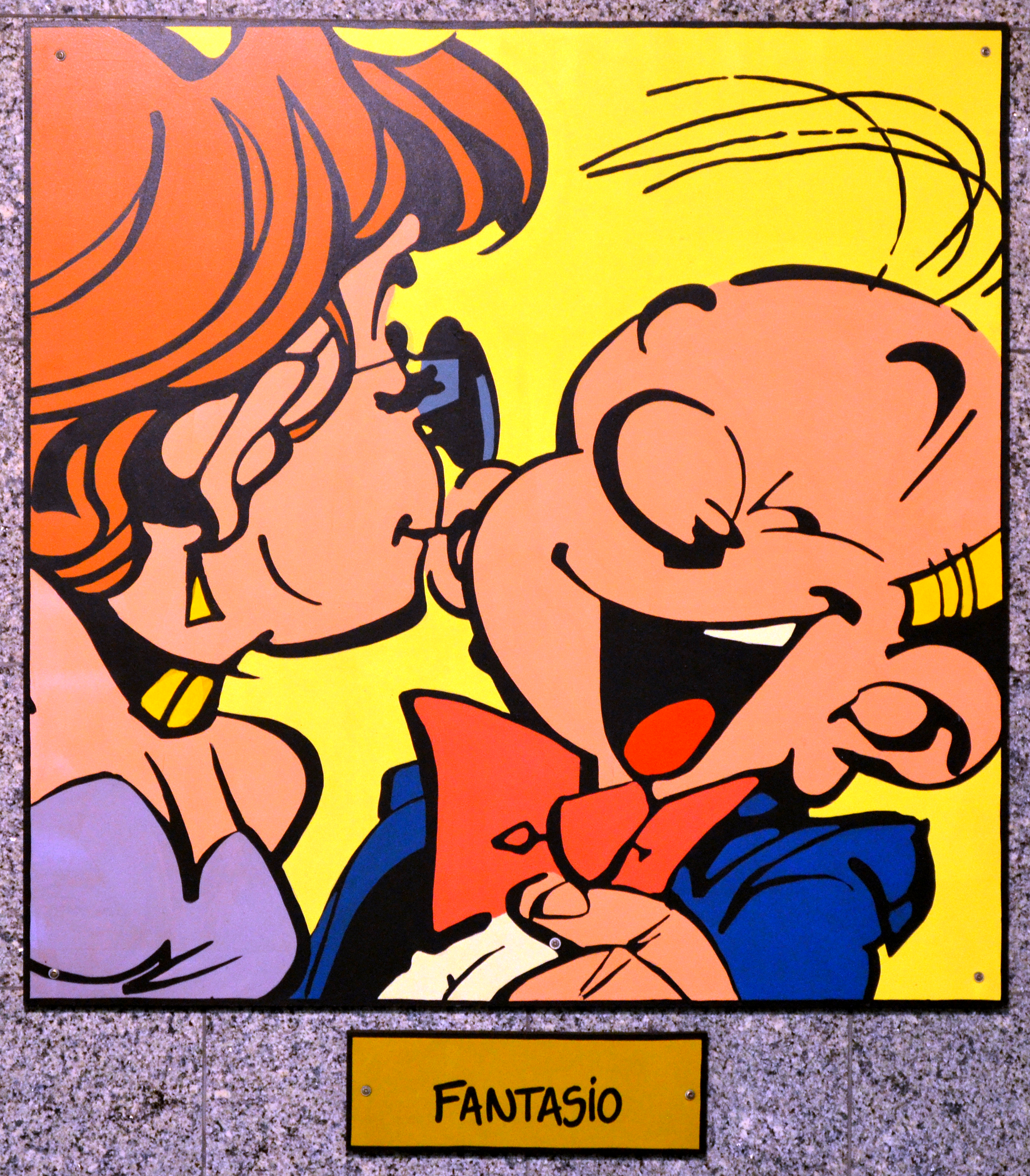 Charleroi (Belgique) - Station Janson du métro léger - Fantasio.